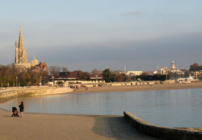 La Rochelle, Plage de la Concurrence, France